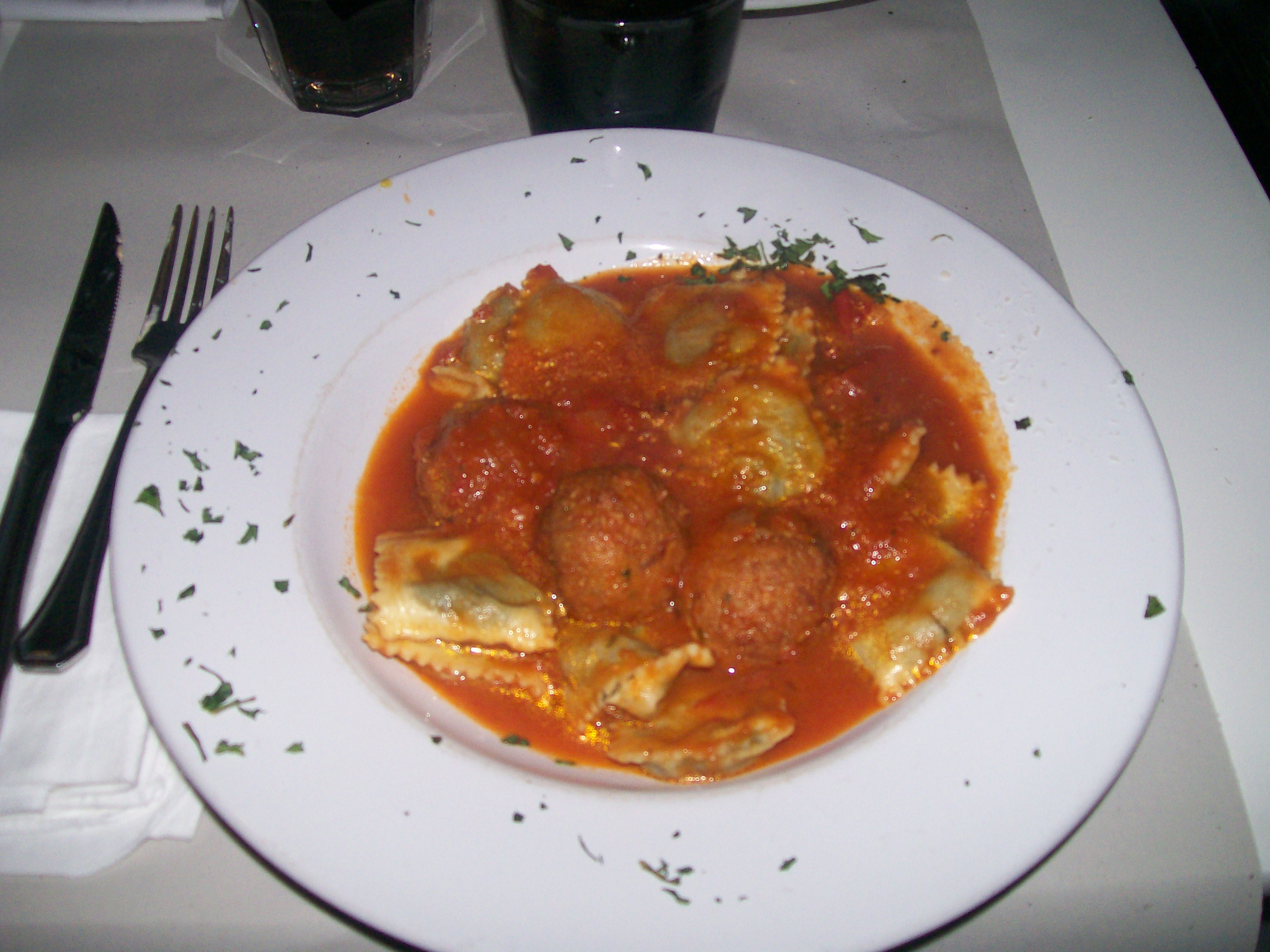 Plato de ravioles, con salsa de tomate y albóndigas